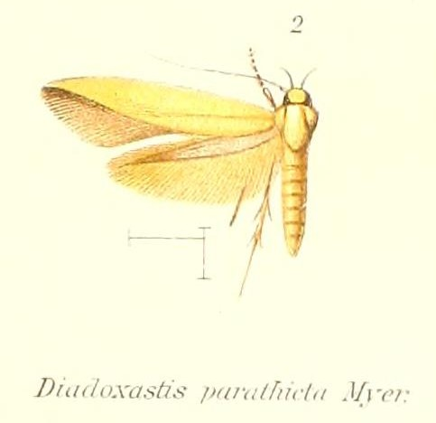 Tortilia parathicta